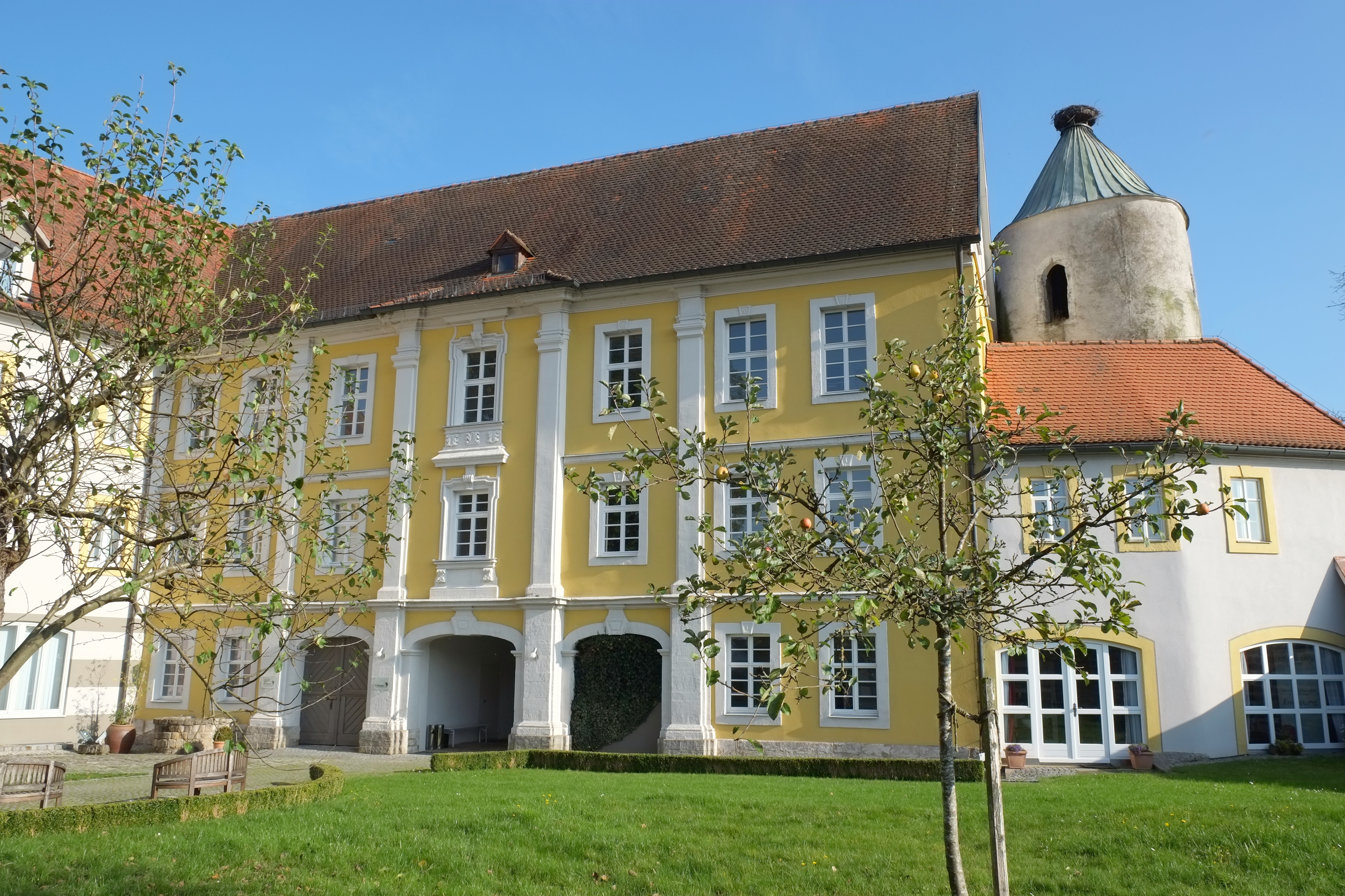 Schloss in Dürrwangen im Landkreis Ansbach (Bayern, Deutschland)